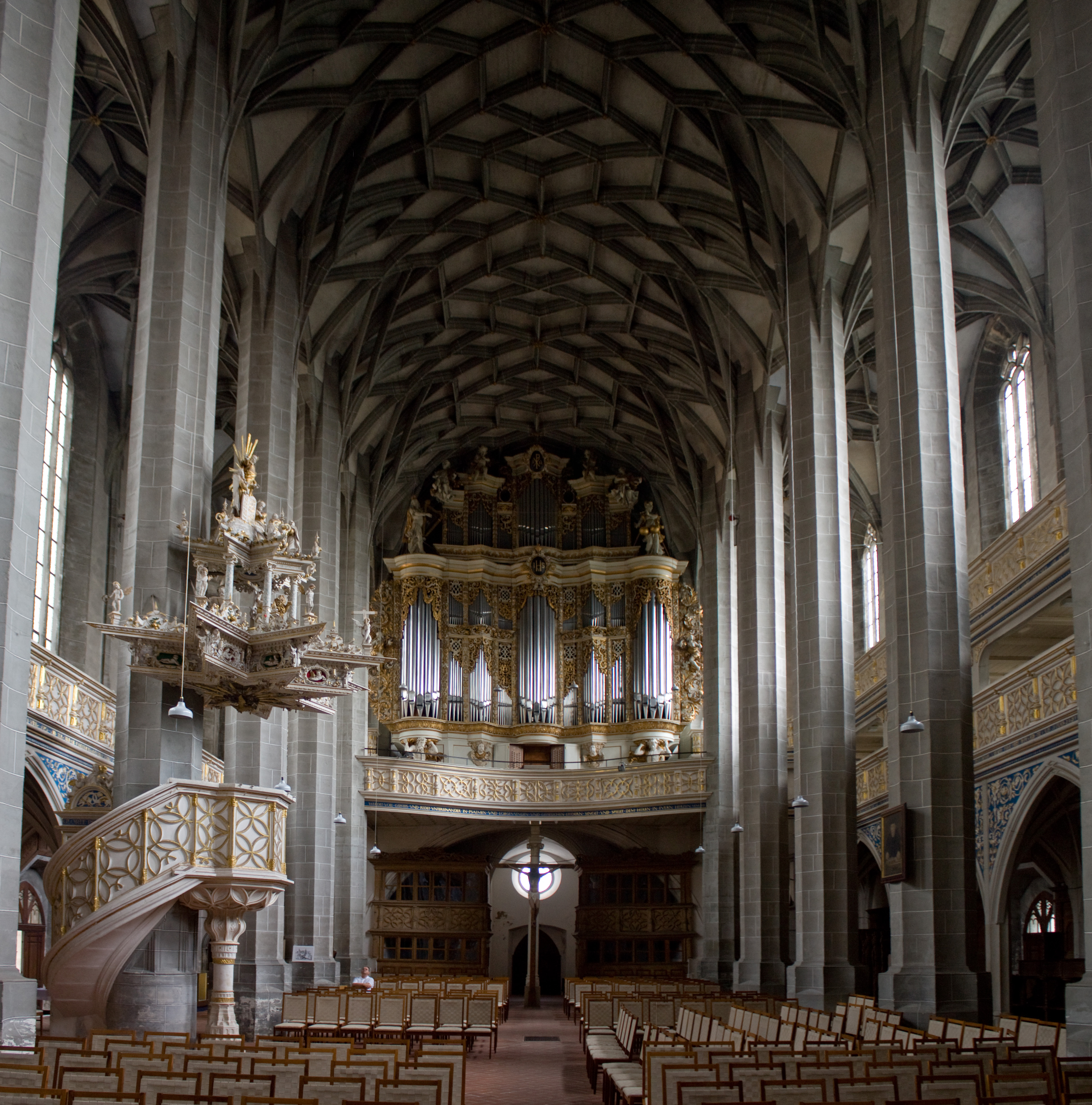 Marktkirche, Halle (Saale)